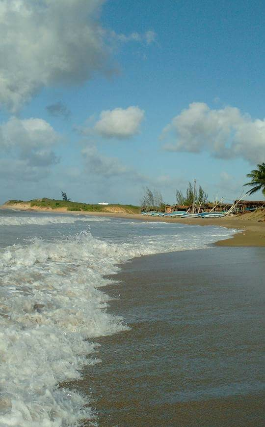 Praia